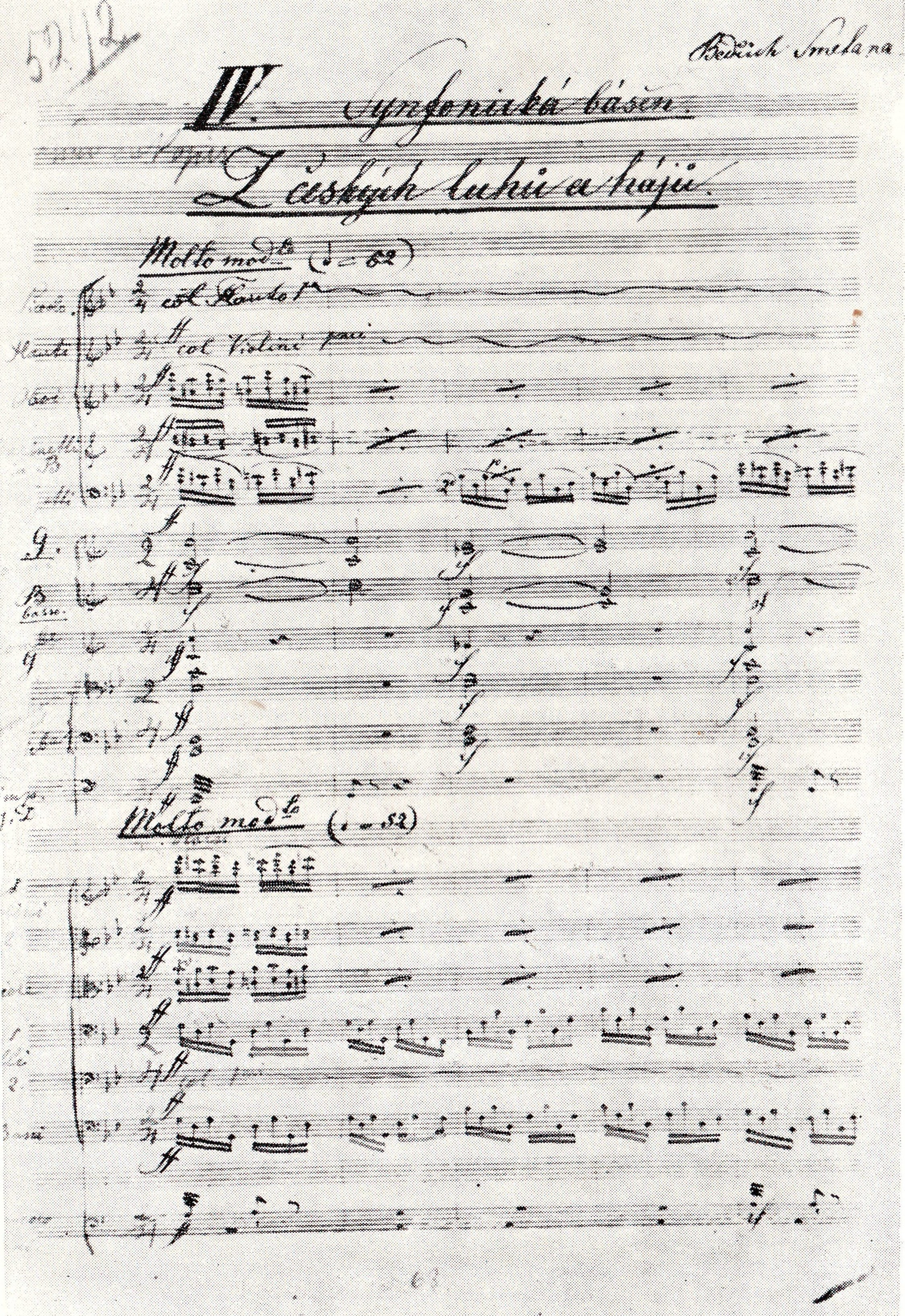 První list originálu partitury Z českých luhů a hájů od Bedřicha smetany